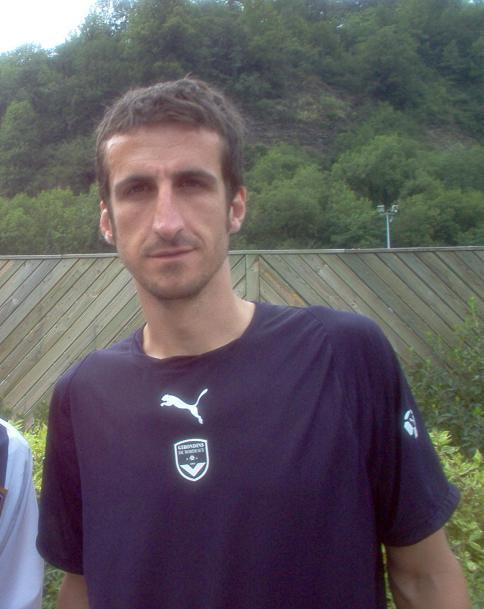 Le footballeur Johan Micoud, des Girondins de Bordeaux, lors d'un stage de présaison à Albertville (France) .